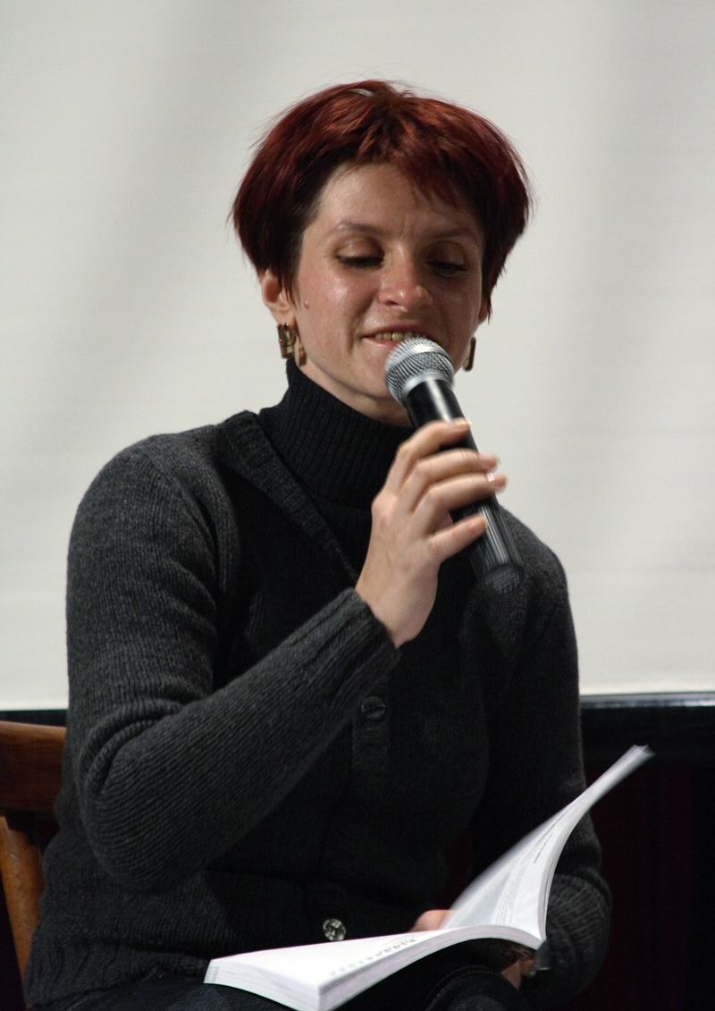 Маріанна Кіяновська, український літератор.